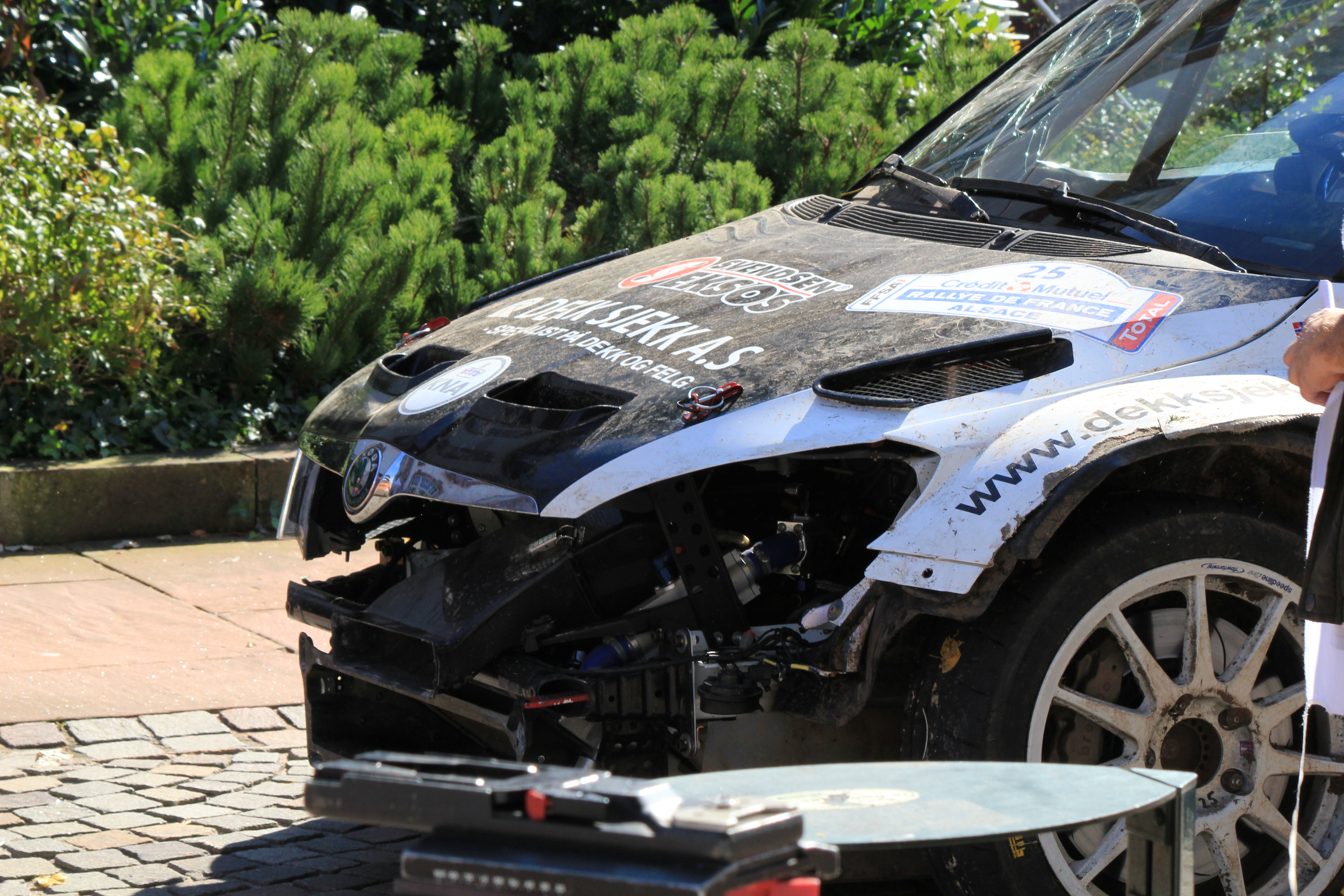 Voiture WRC Skoda endommagée à l'arrivé de la dernière étape à Haguenau, lors du rallye d'Alsace en France, au Championnat du monde des rallyes 2010.